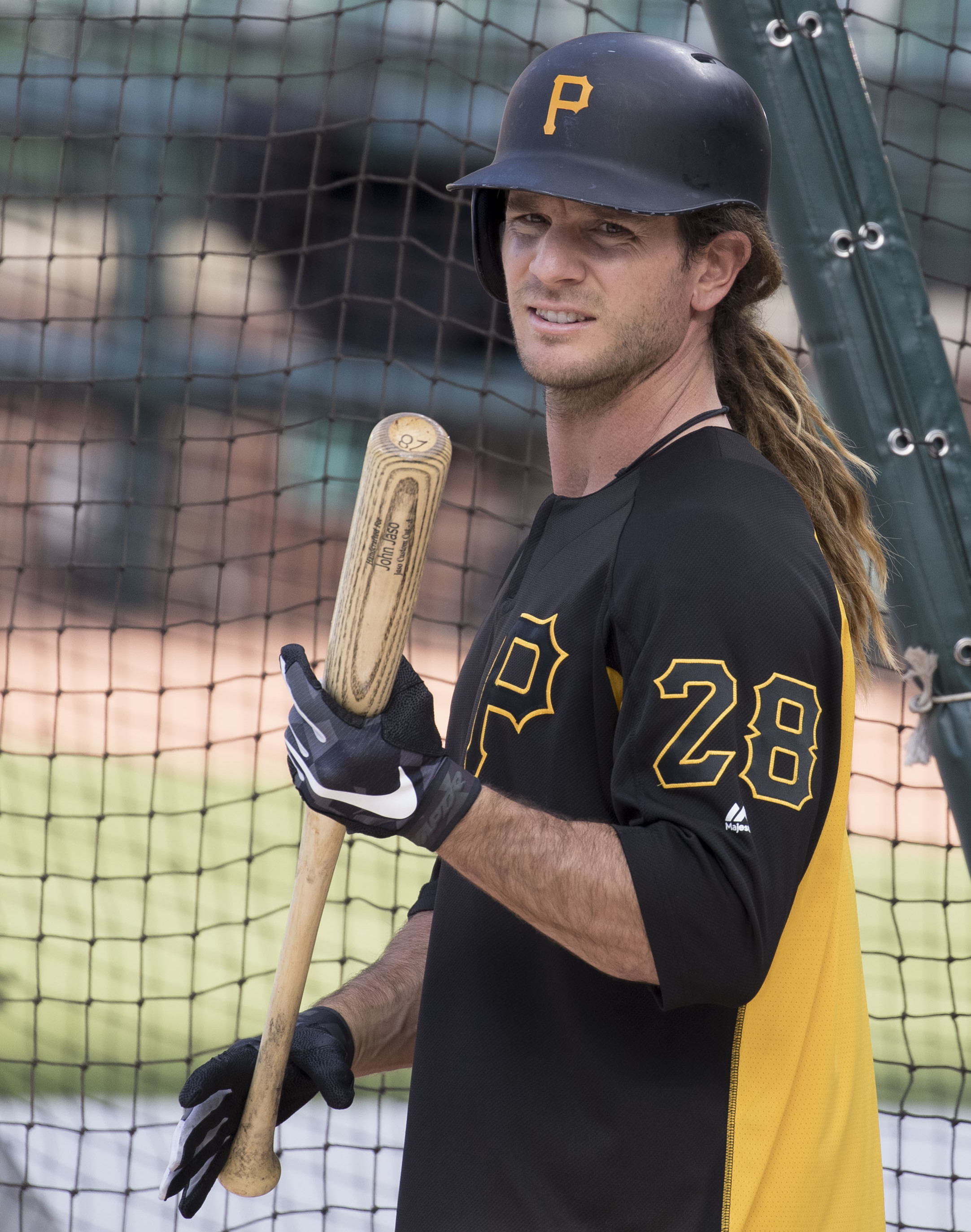 Pirates at Orioles 6/6/17